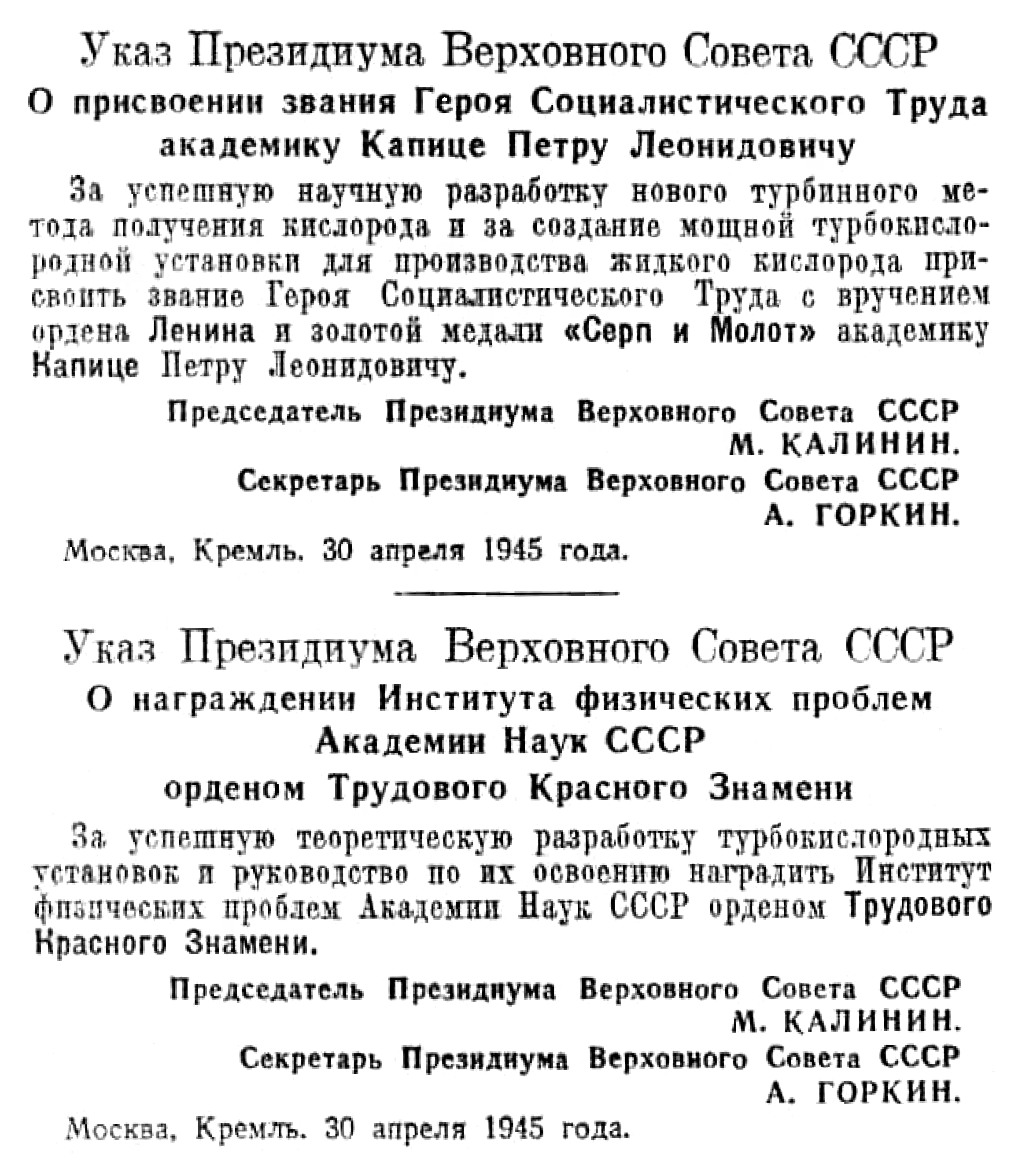 Указ о присвоении звания Героя Социалистического Труда академику П. Л. Капице